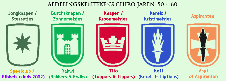 In kleur gerecreëerde afdelingskentekens met hun overeenkomstige namen.